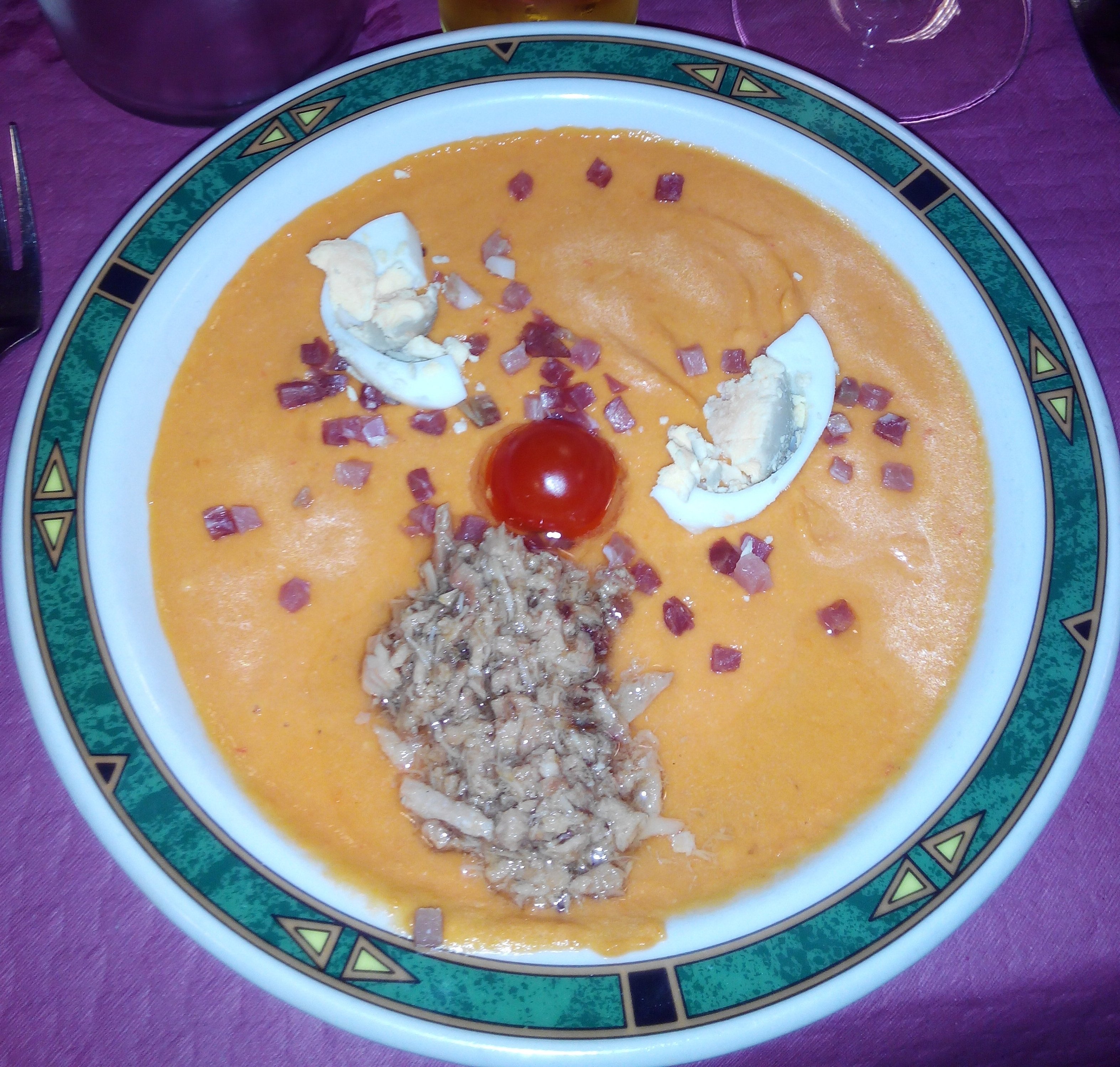 Porra antequerana. Plato típico de Antequera (Málaga, España)